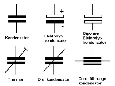 Schaltzeichen von Kondensatoren